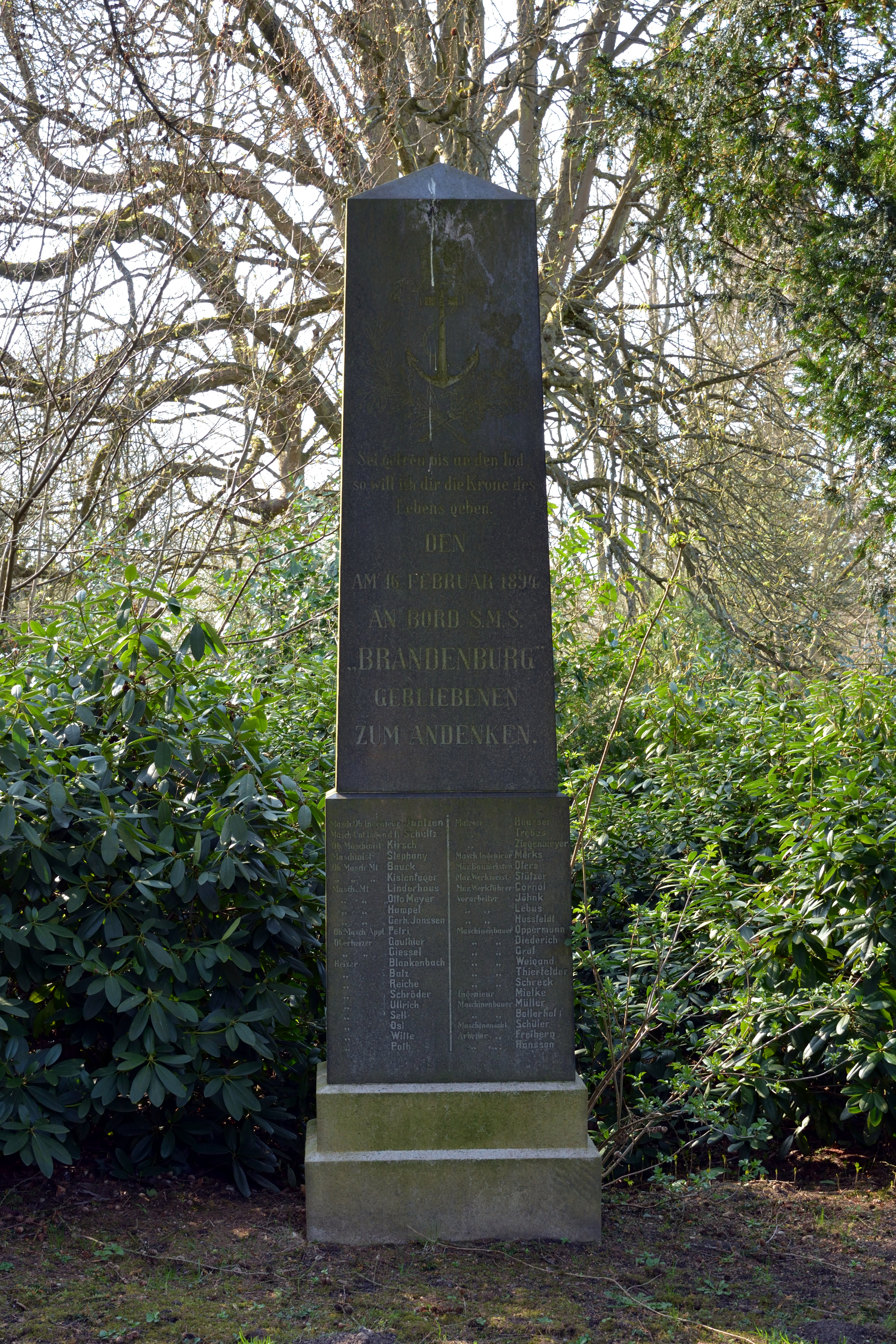 Impressionen vom Nordfriedhof in Kiel: Gedenkstein für SMS Brandenburg (ship, 1891)